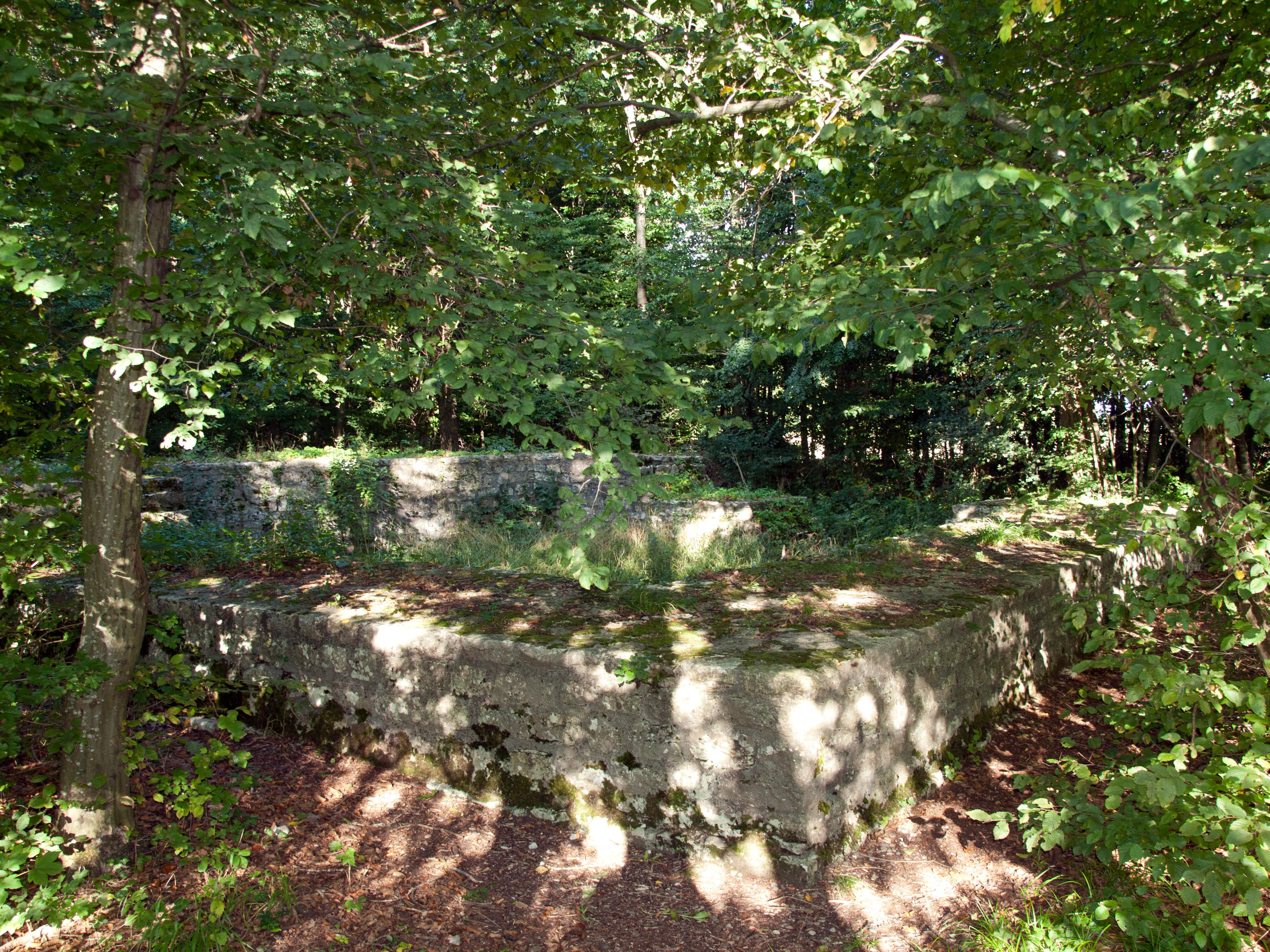 Teil der spätrömischen Rheinbefestigung im Pferrichgraben, Rheinfelden AG